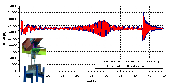 Übereinstimmung von Messung und Berechnung der dynamischen Größen beim Polygoneffekt